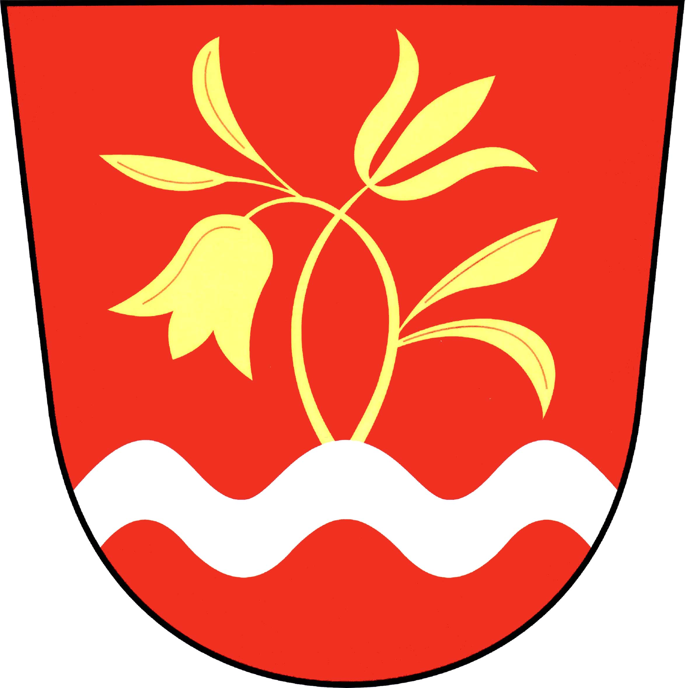 Česky: znak obce Čermná